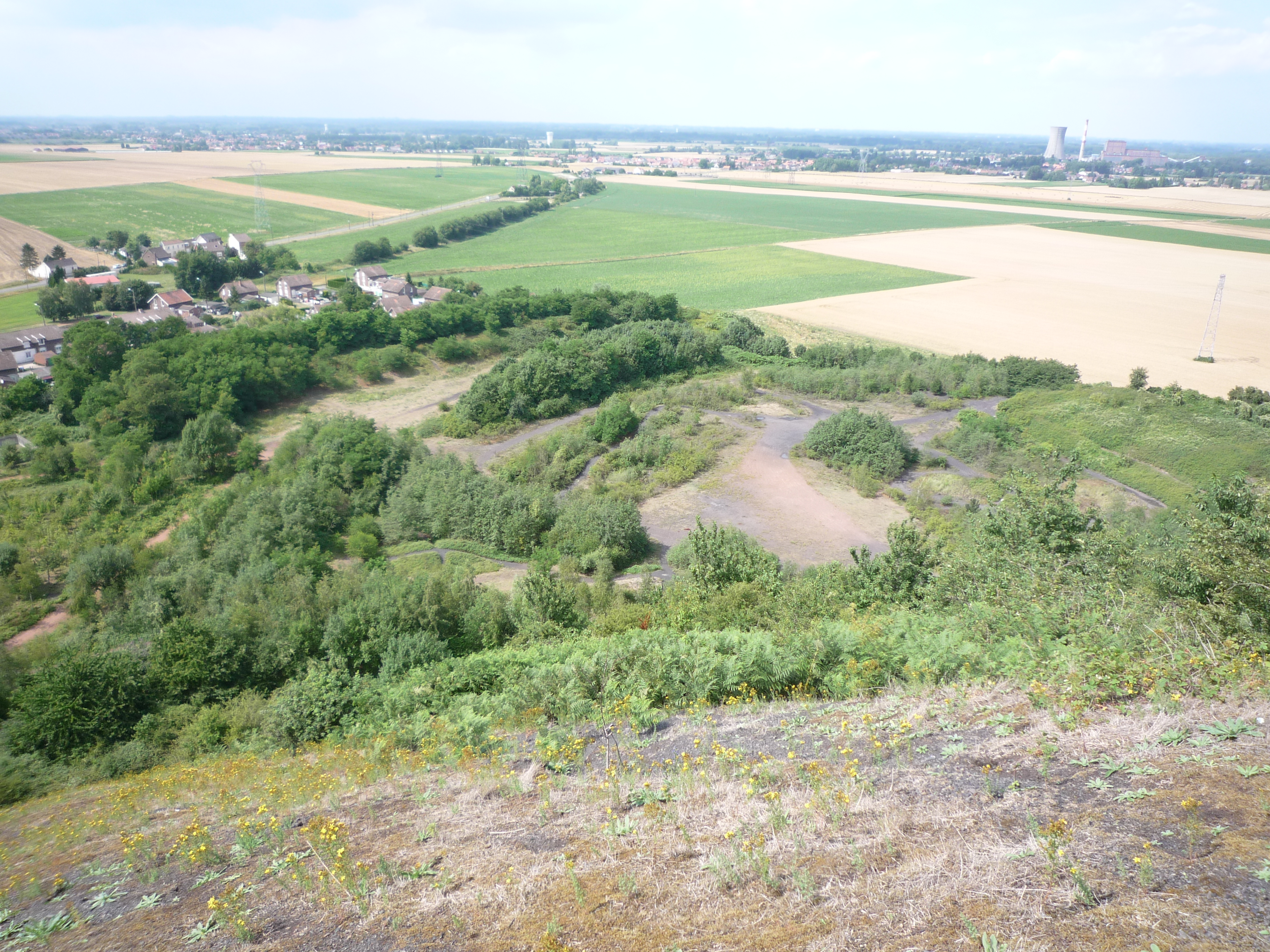 Terril Audiffret Nord de la Fosse Audiffret Pasquier de la Compagnie des mines d'Anzin à Escaudain, Nord, Nord-Pas-de-Calais, France vu depuis le sommet du terril Audiffret Sud.